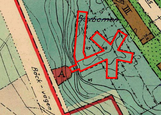 Nesslans läge på en stadsplan från 1942.